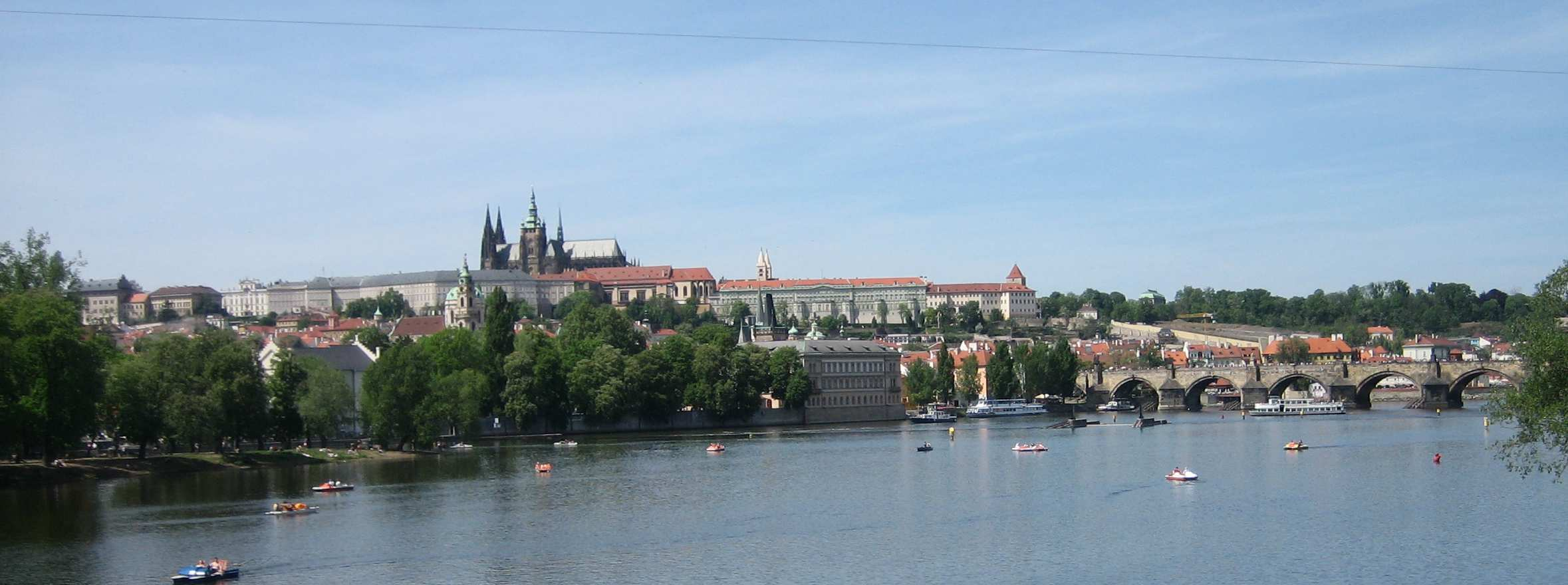 Vue iwwer d'Vltava (Moldau) op d'Prager Buerg